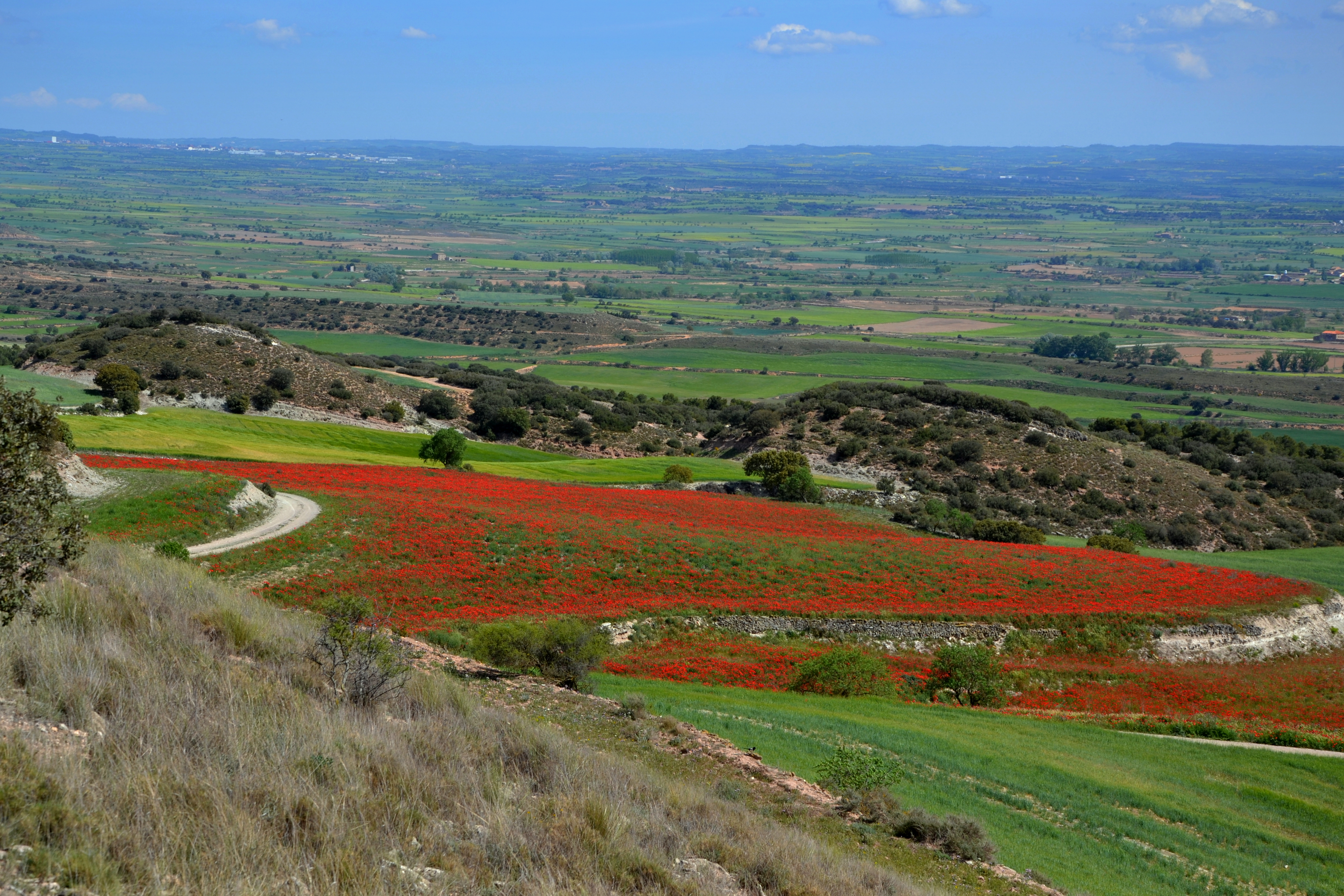 Bellmunt-Almenara This is a a photo of a natural area in Catalonia, Spain, with id: ES510177